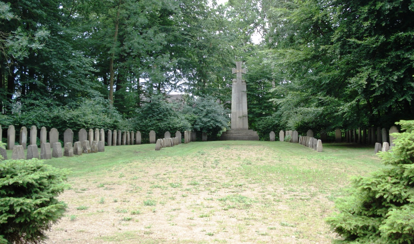 Das Ehrenmal im Riesebusch